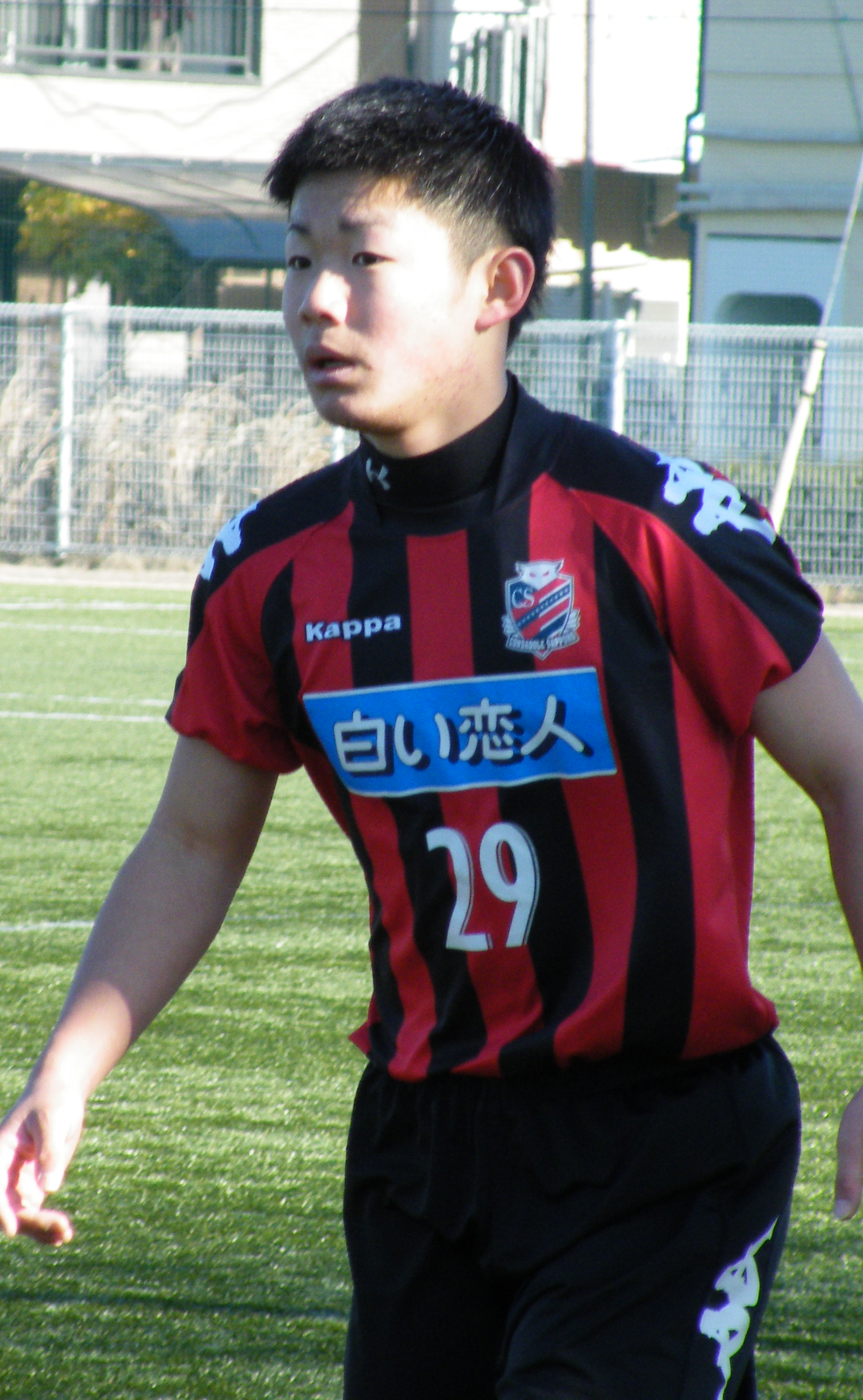 菅大輝（北海道コンサドーレ札幌）